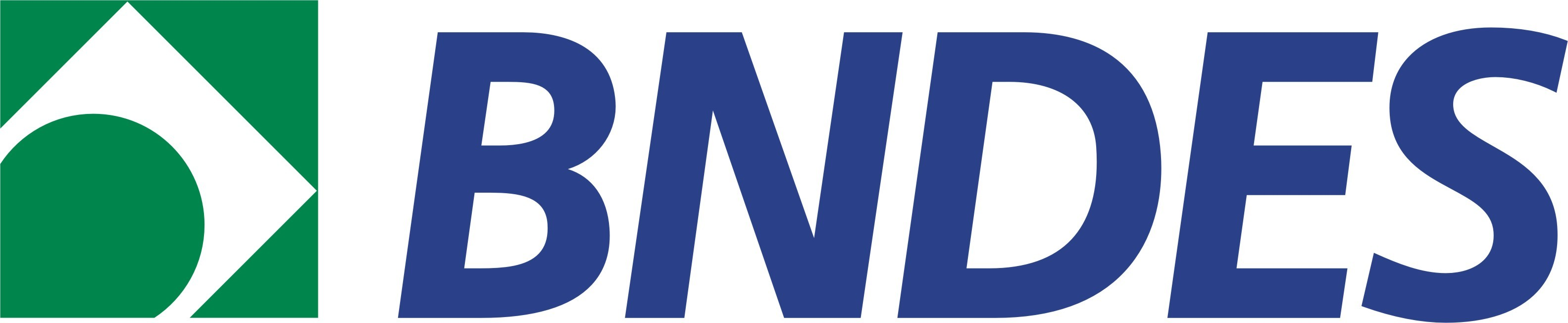 image